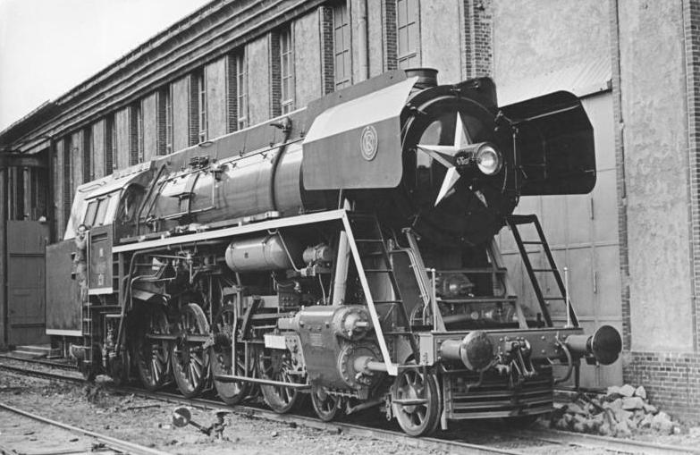 Tschechische Dampflok 476137 Zentralbild Illner 4.9.1952 Leipzig bereitet sich auf die Messe vor. Eine Schnellzuglokomotive aus der CSR. [Tschechische Dampflok 476137]